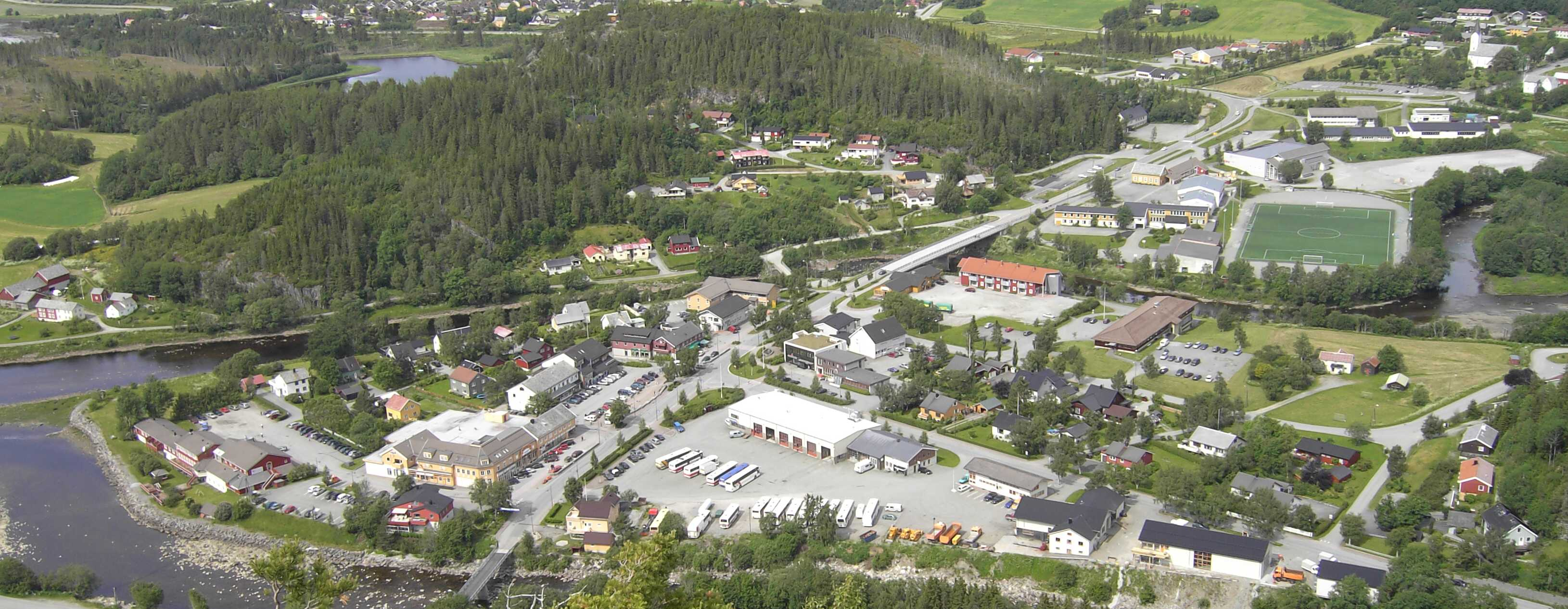 Aarnes i Aafjord as seen from Maelanakken